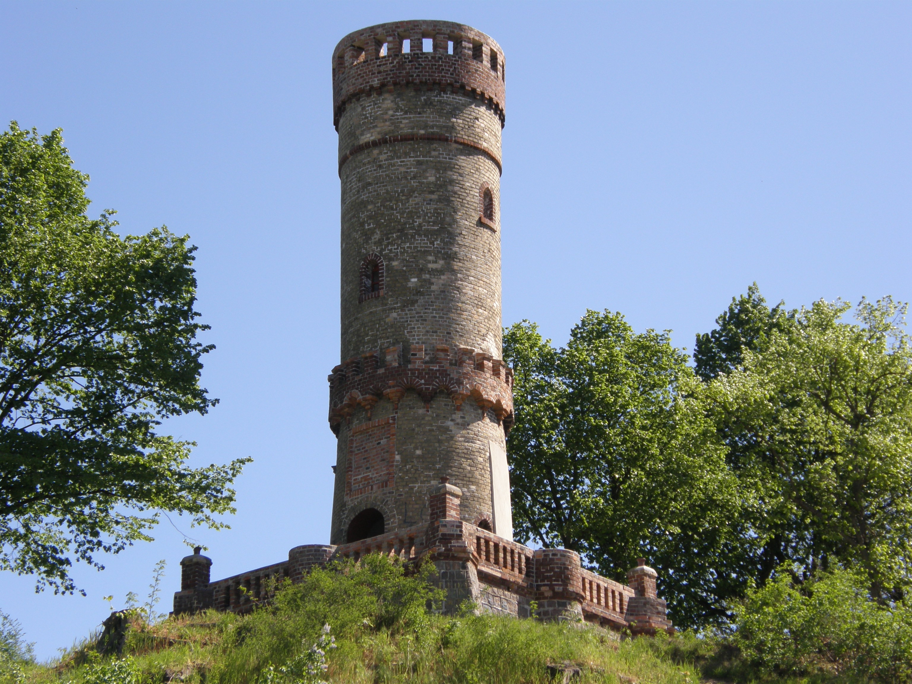 Cedynia - wieża